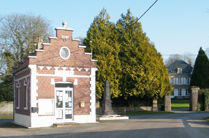 La place de Vercourt